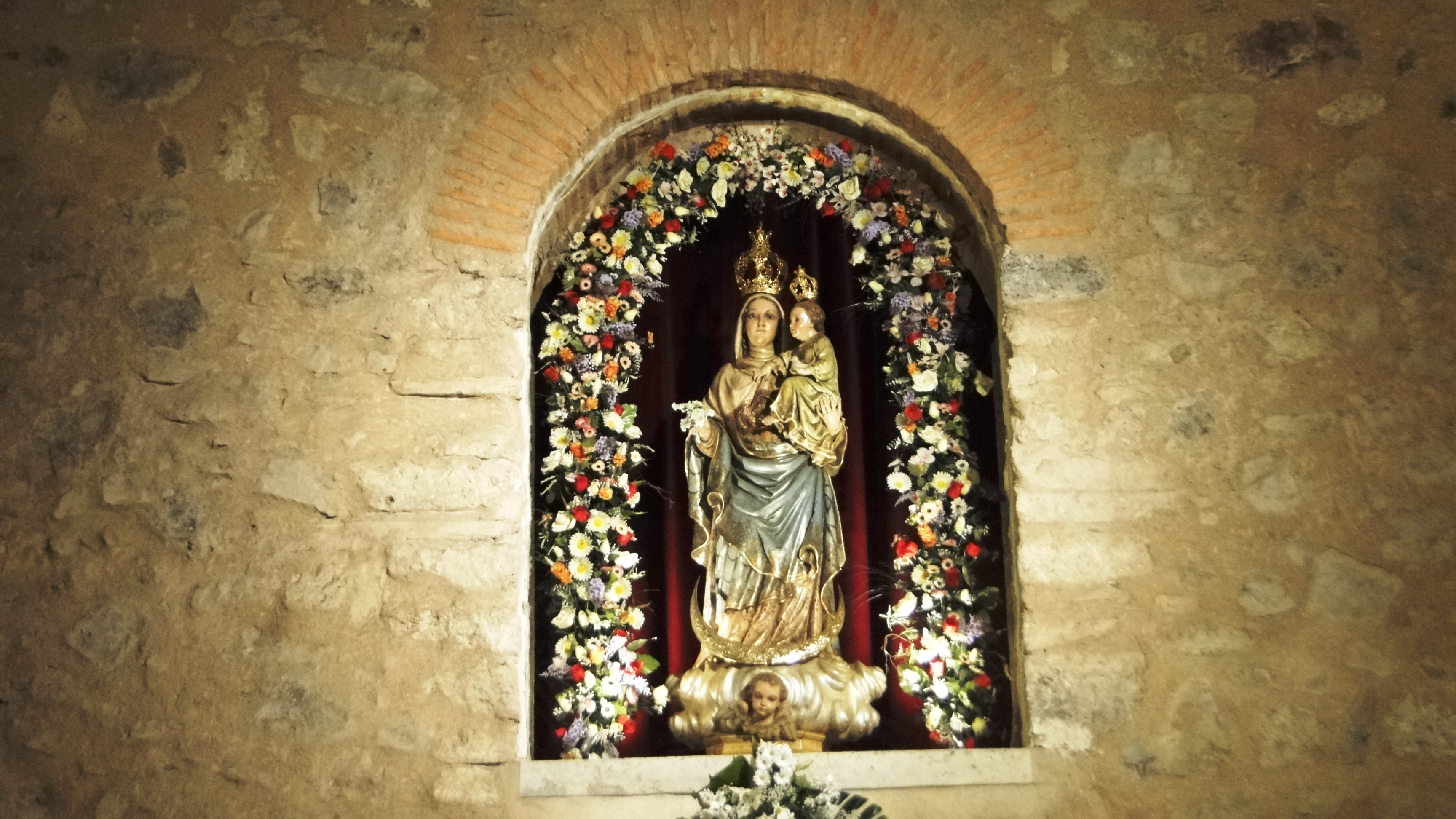 Ciudad Real - Santuario de Nuestra Señora de Alarcos a 8 Kms. de Ciudad Real